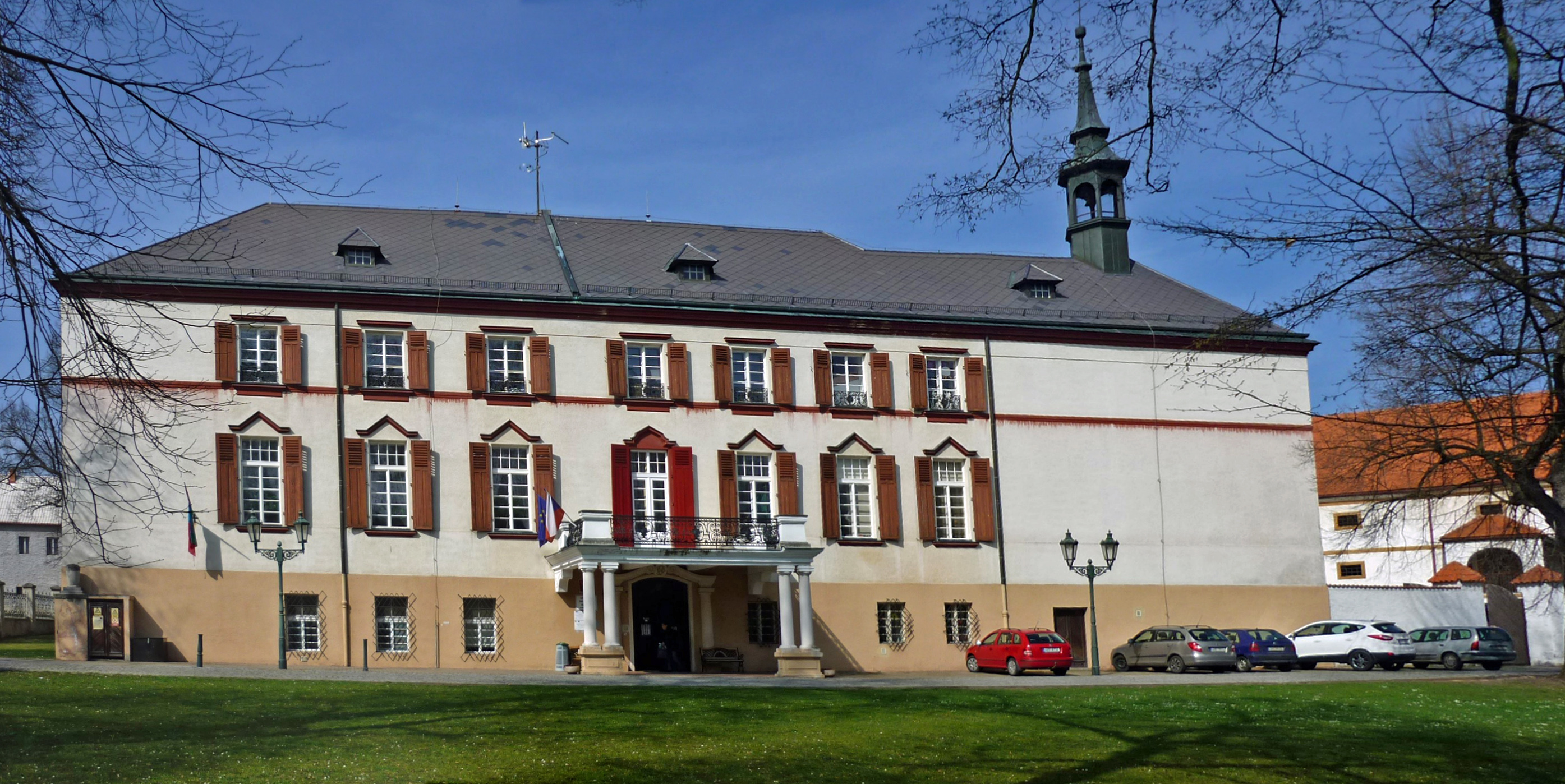 Schloss Michelob (Měcholupy)